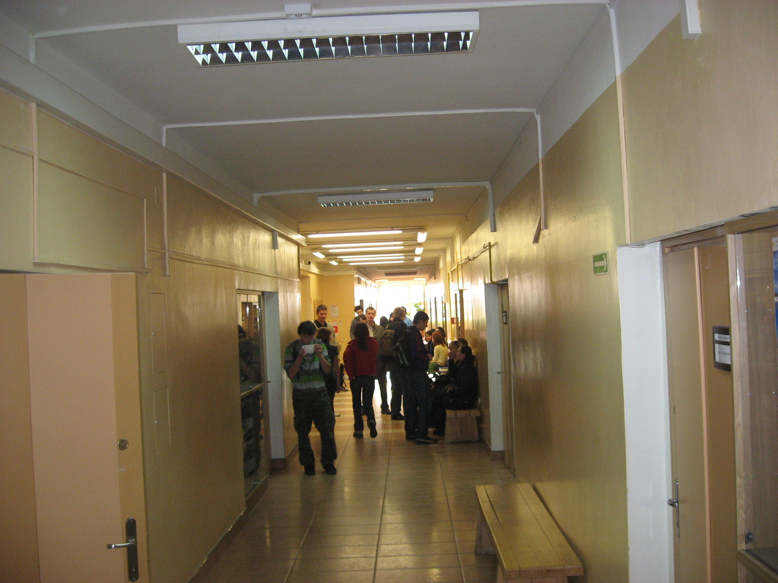 prywatne